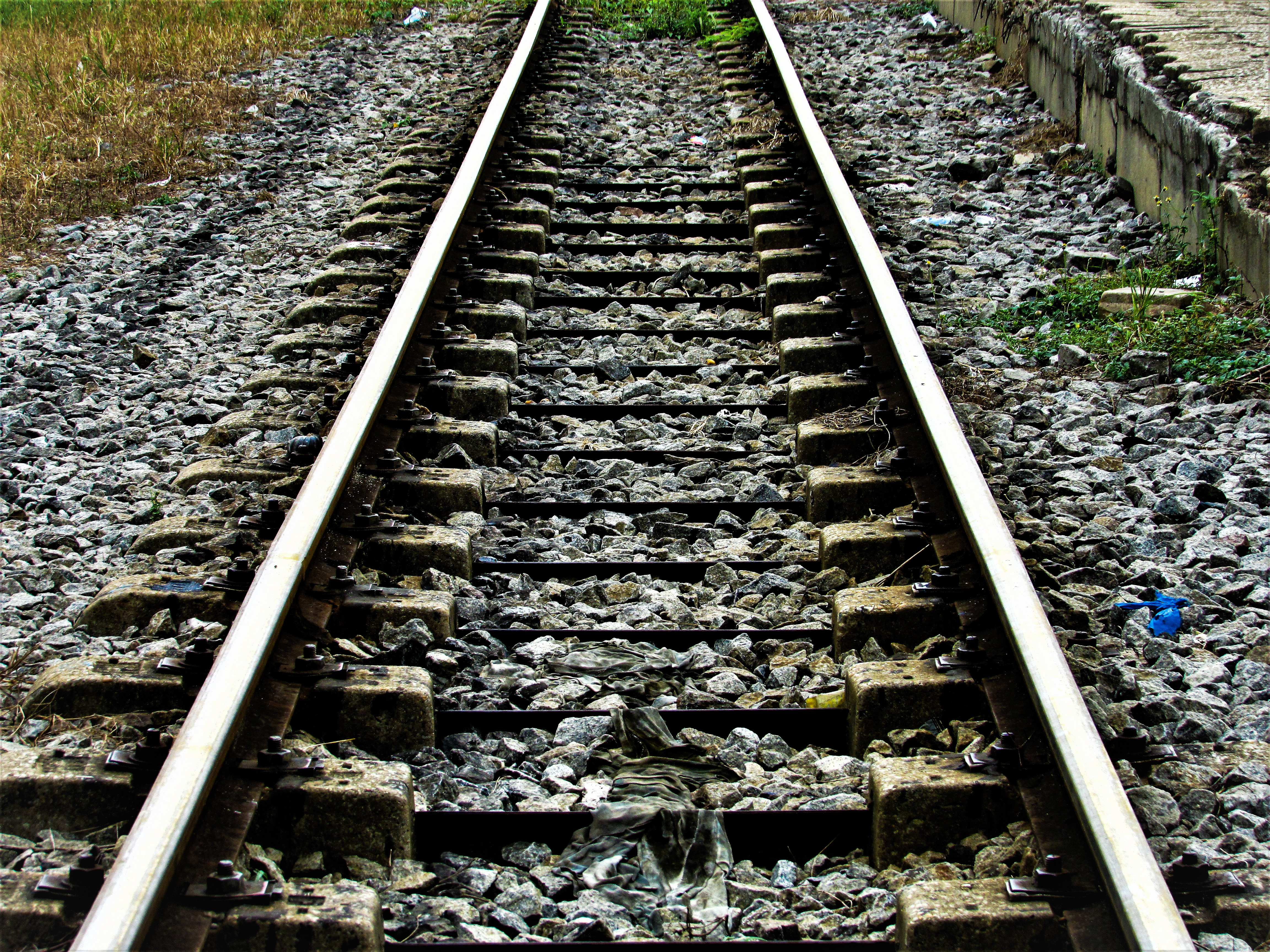 image réprésentant la ligne de chemin de fer de la gare de train abidjan adjamé , This is an image with the theme "Africa on the Move or Transport" from: Ivory Coast